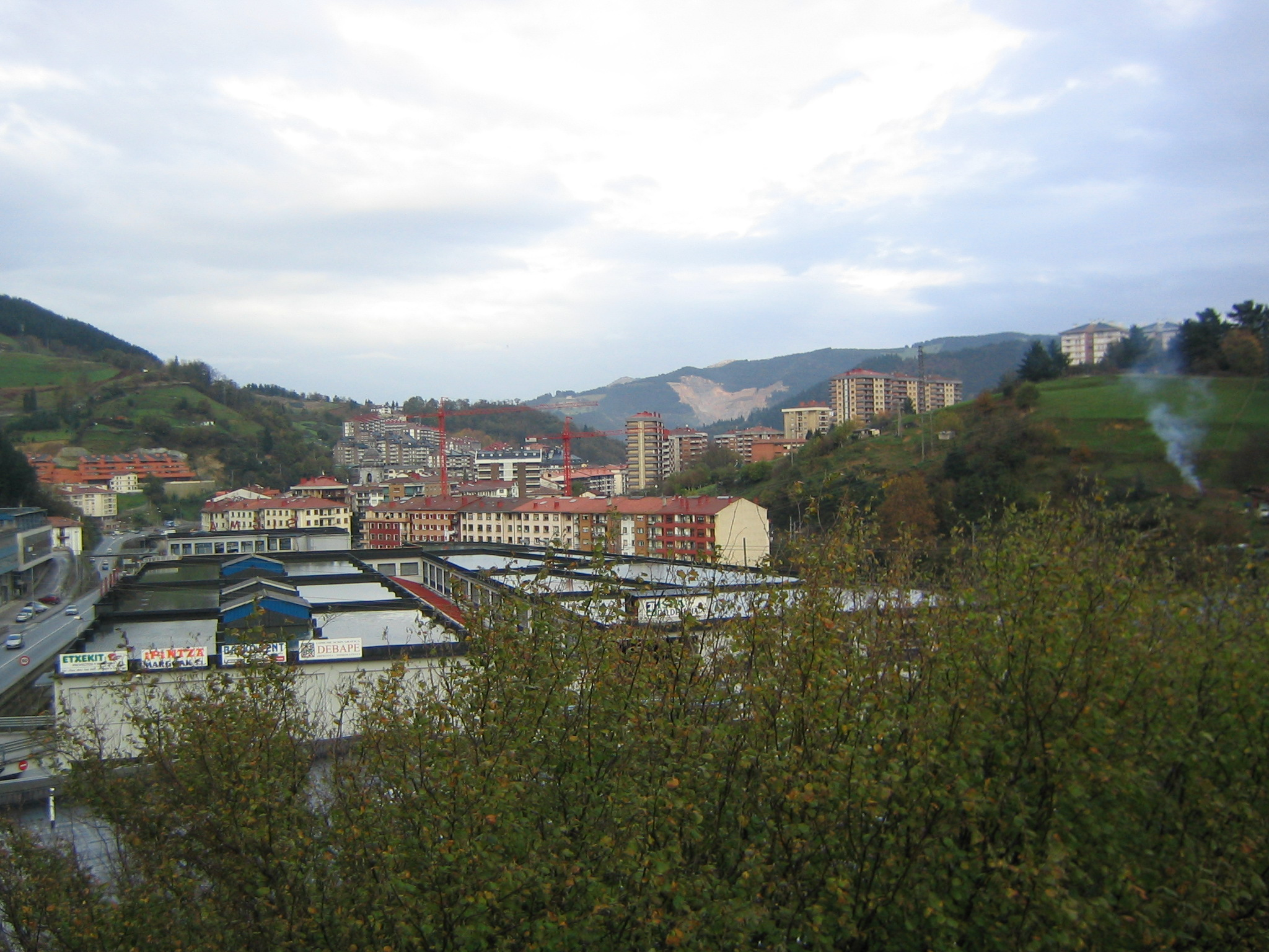 Vista parcial de Elgoibar, Guipúzcoa, País Vaco, España.